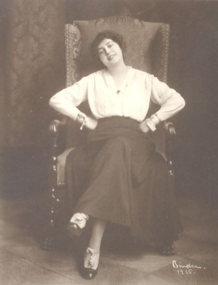 Foto der Schauspielerin Tatjana Irrah